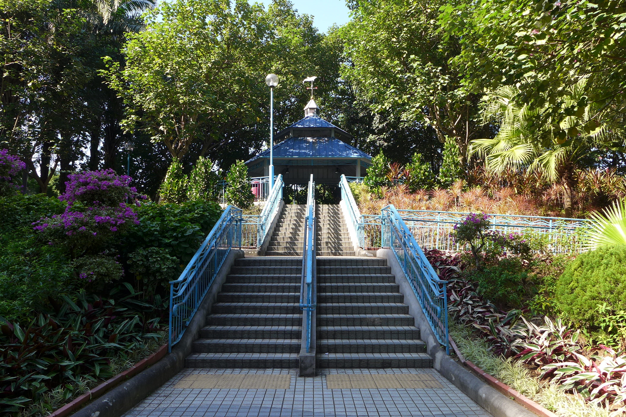 Belcher Bay Park Sunset Looking Pavilion